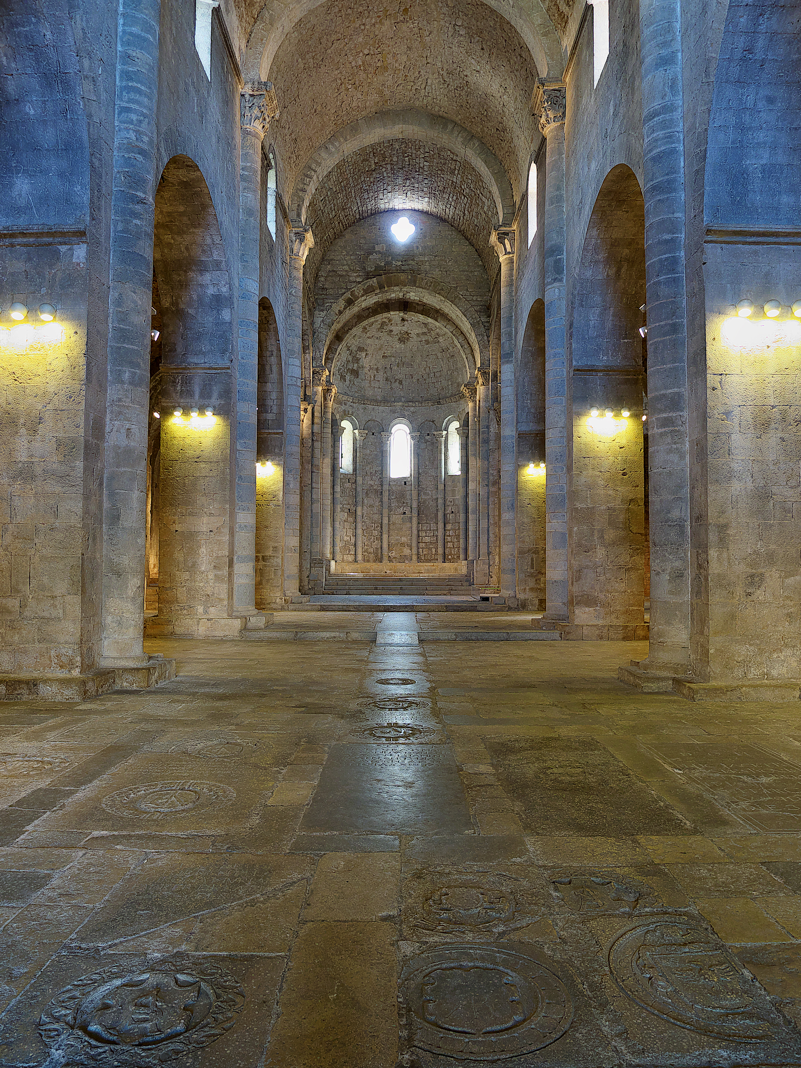 Esta iglesia románica de planta basilical (s. XII) con importantes elementos decorativos, principalmente los capiteles, nos indica la magnitud alcanzada por este monasterio benedictino.